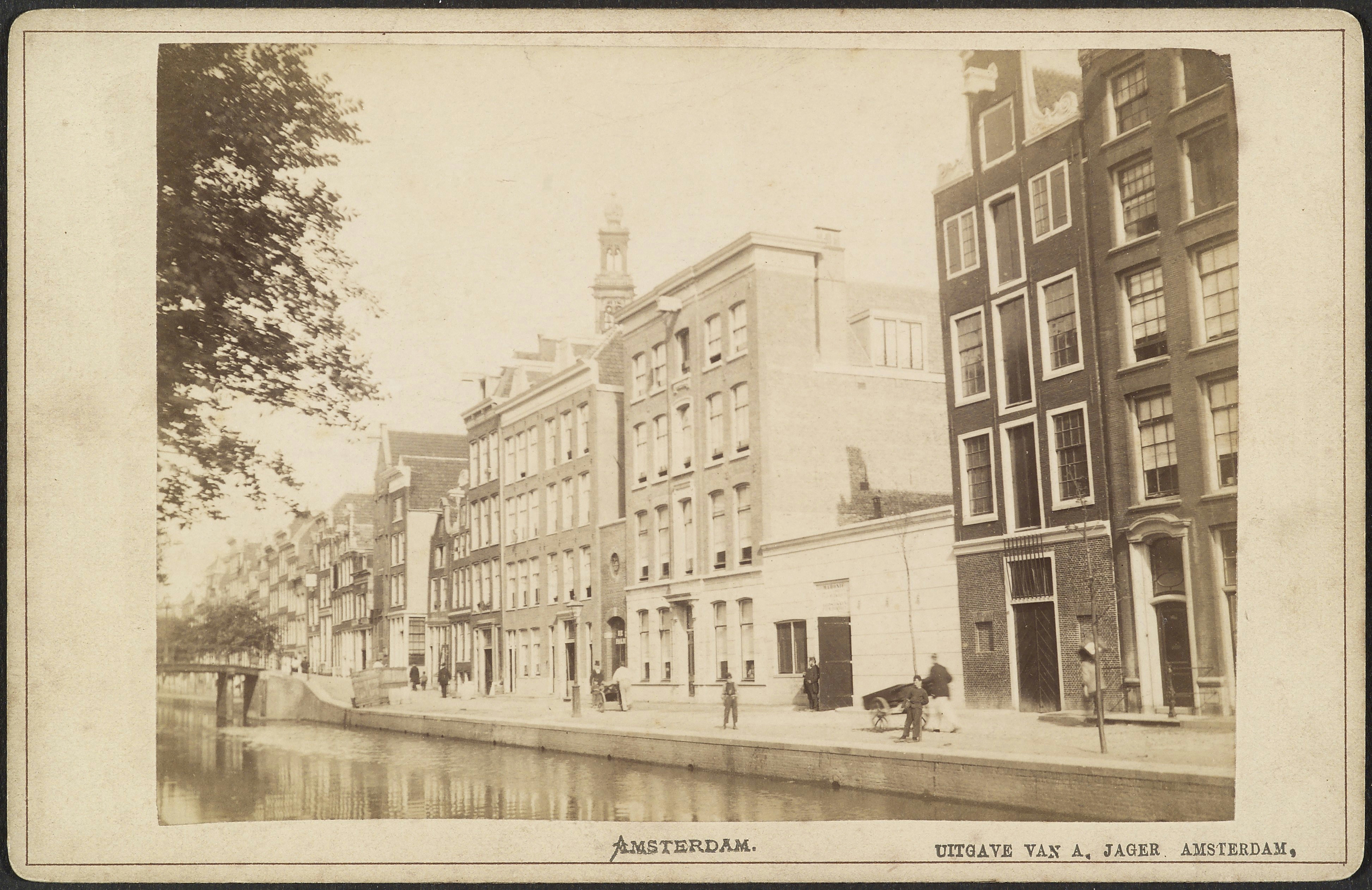 Gevelwand: Gevelwand aan gracht (opmerking: Uitgave van A. Jager Amsterdam); Bloemgracht 53-71 (vlnr); gebouwen 55 (521), 65 (522), 69 (523) en 71 (524) zijn rijksmonumenten; de laagbouw is gebouw 67 Wijklokaal van de Lutherse Diaconessen Inrichting